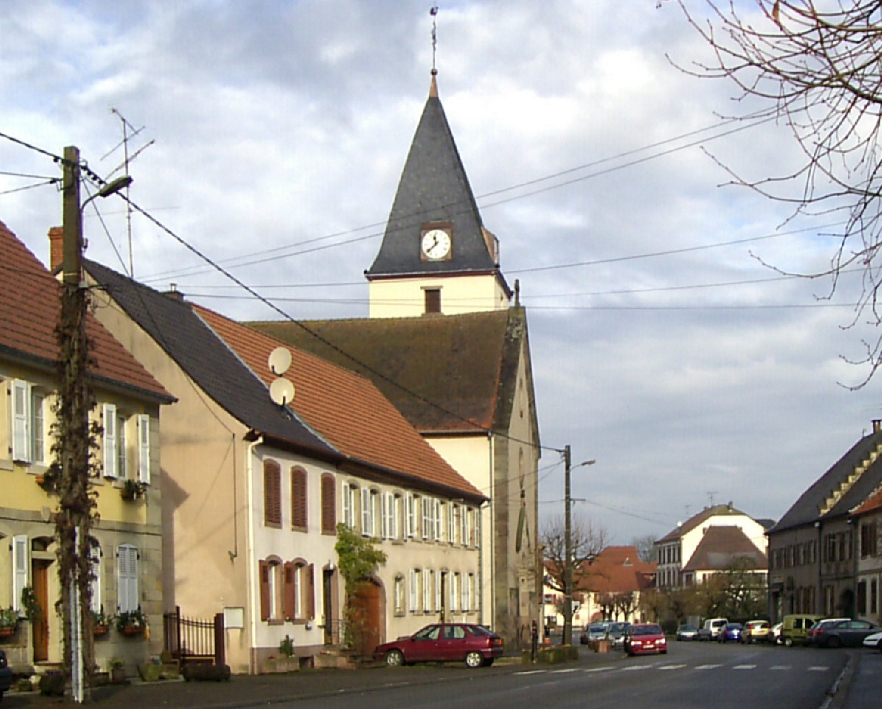 La Rue de Fénétrange de Harskirchen avec la tour de l'église de Saint-Nicolas